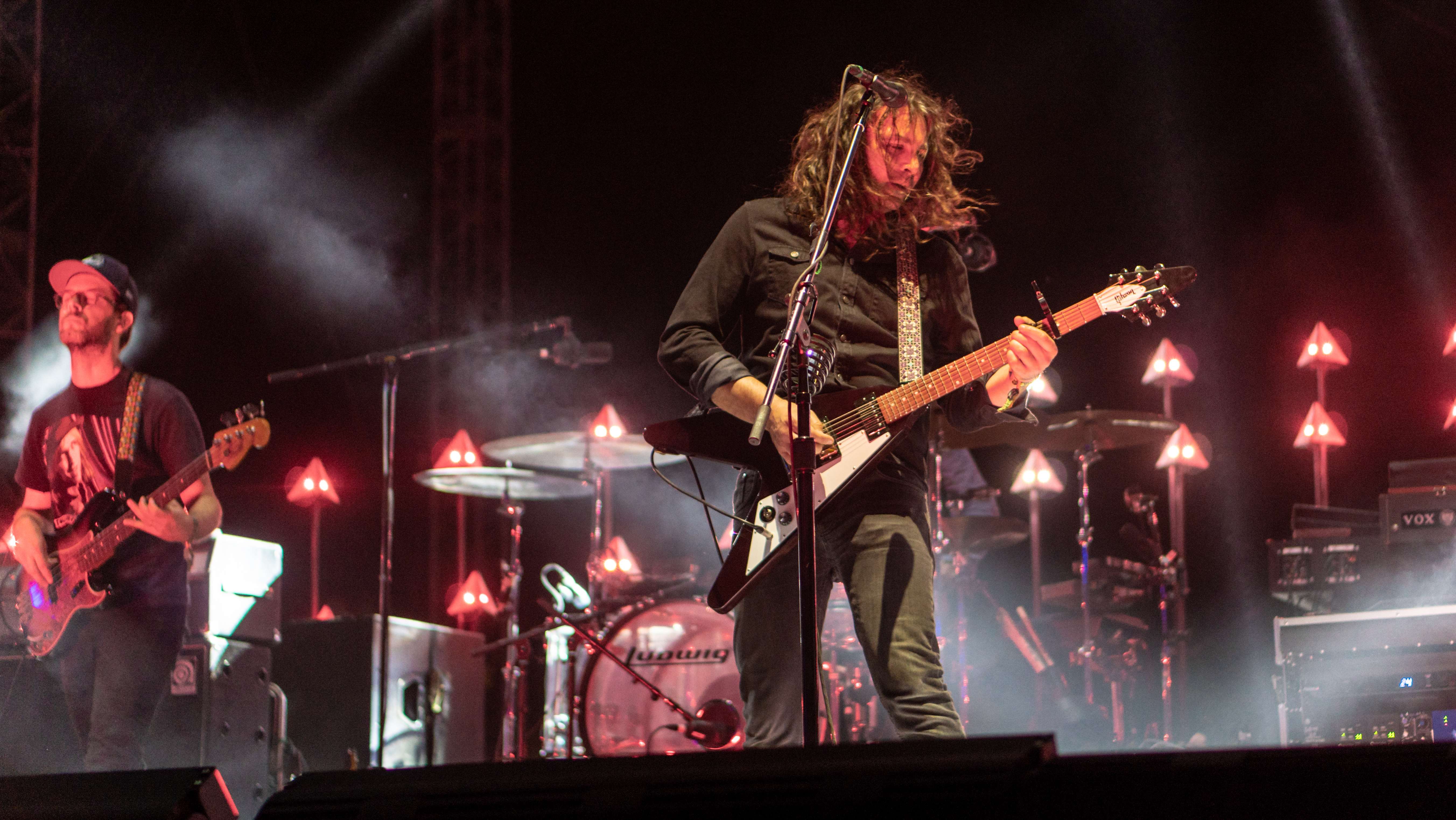 Coachella18W1-42